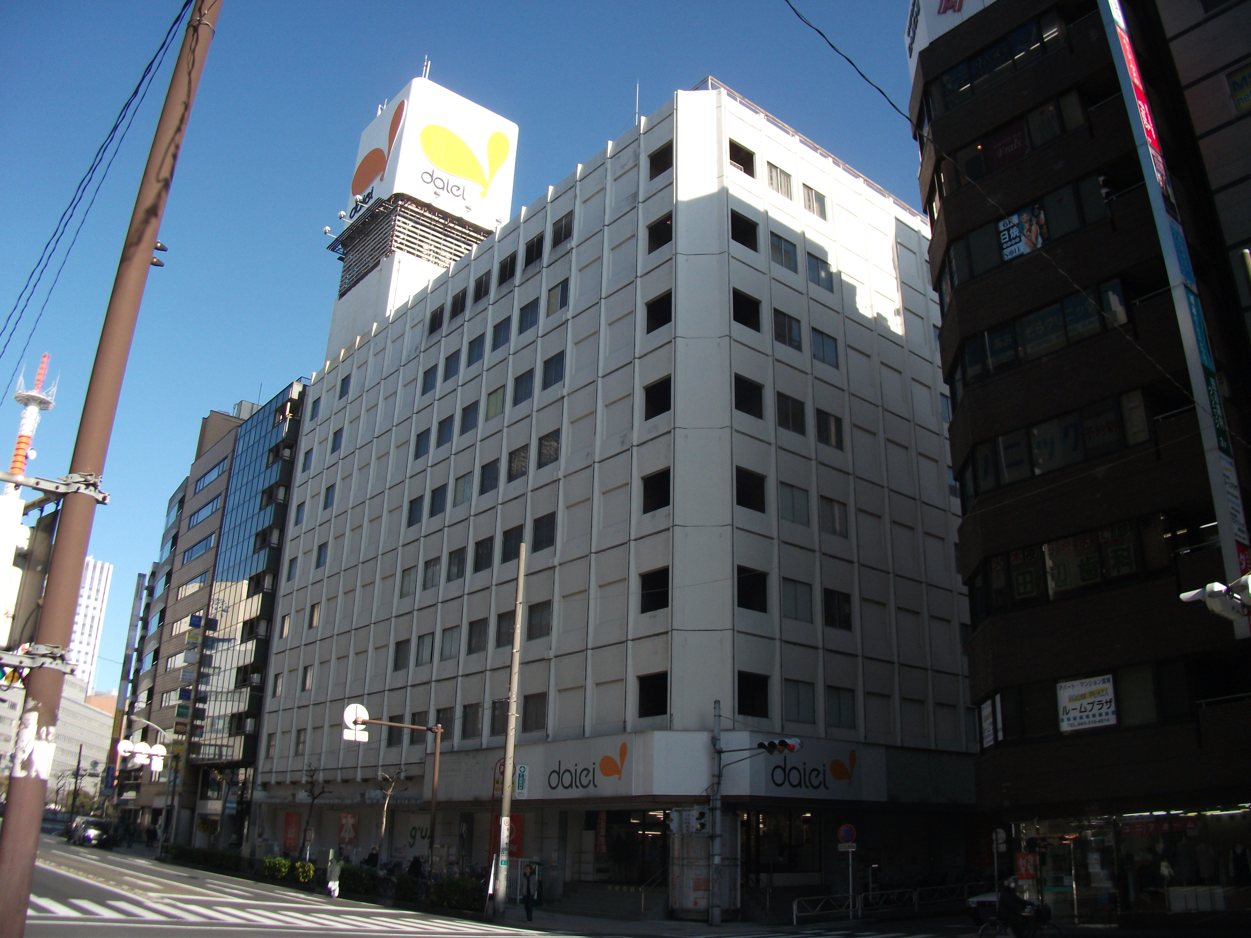 ダイエー横浜西口店